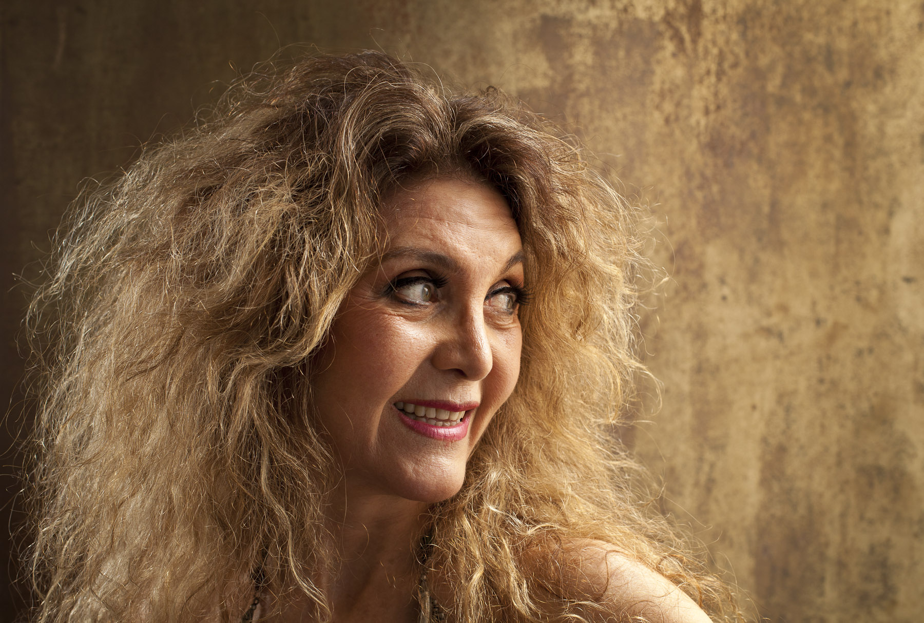 SÃO PAULO, SP, BRASIL, 22-01-2013: Wanderleia. (Foto: Zé Carlos Barretta/Folhapress MONICA BERGAMO)